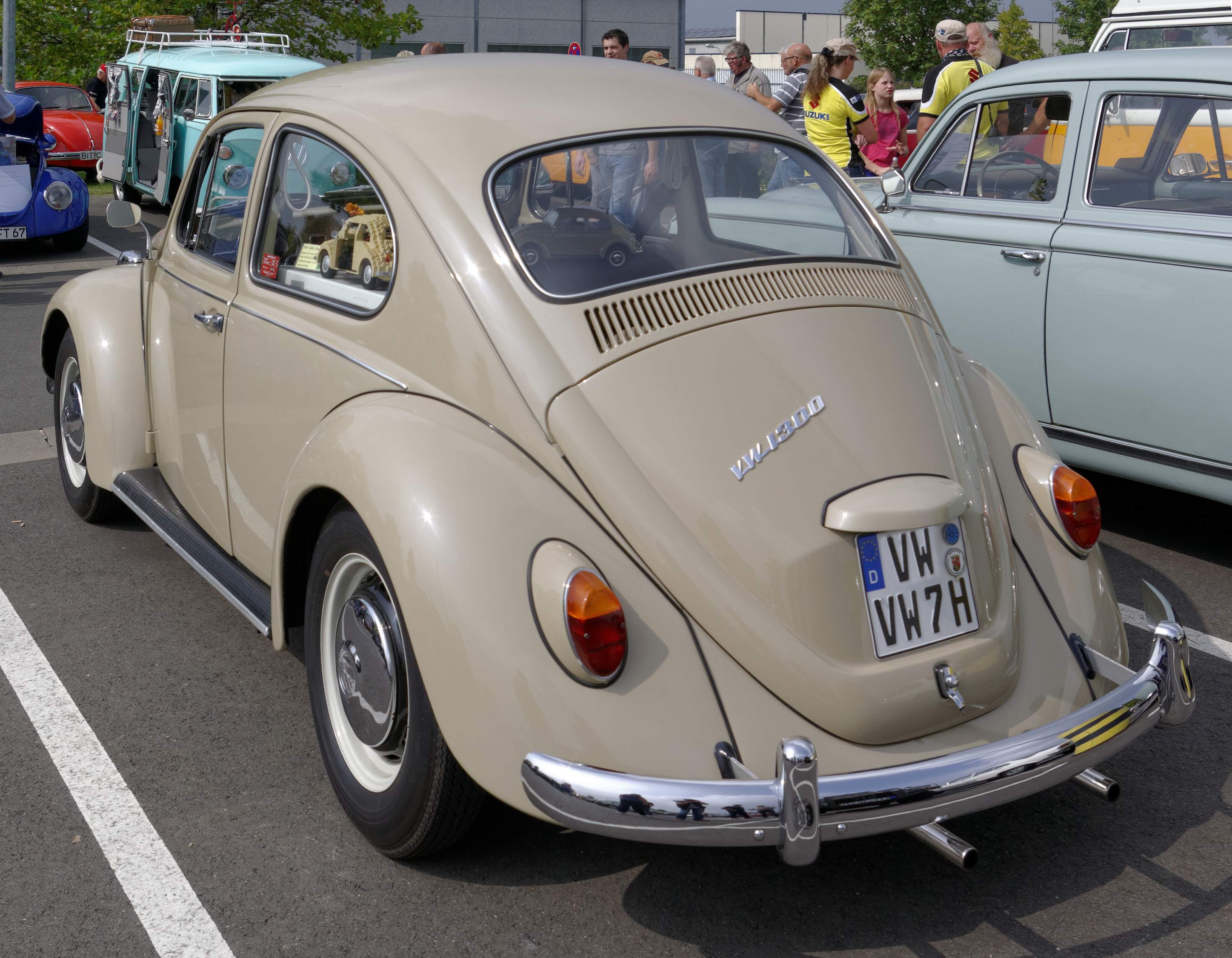 VW Käfer 1300, Baujahr 1967, 40 PS Bitburg Classic 2014 Das Nummernschild ist verfälscht